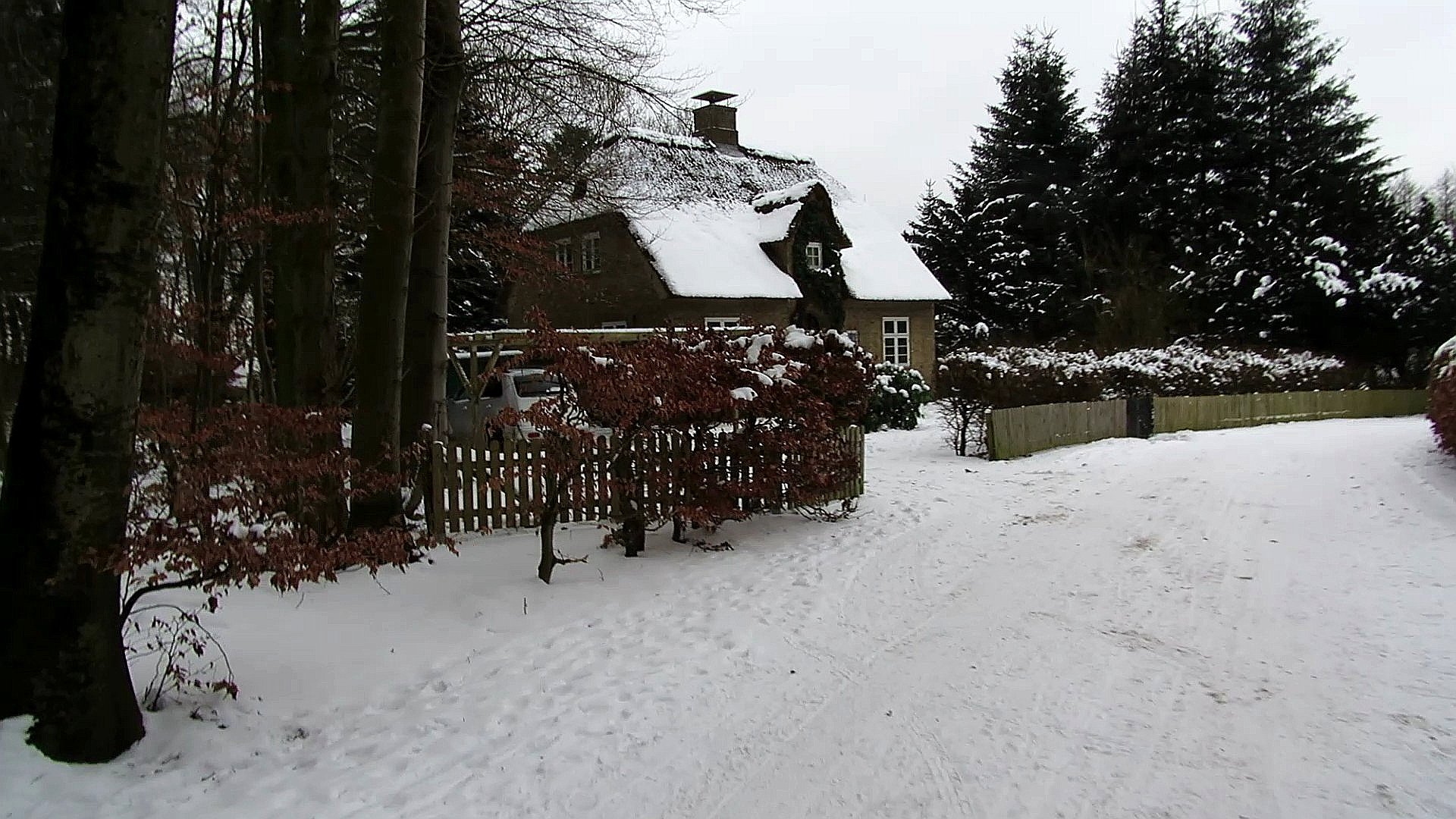 Das eine Forsthaus, Marienhölzung, Flensburg, Januar 2013